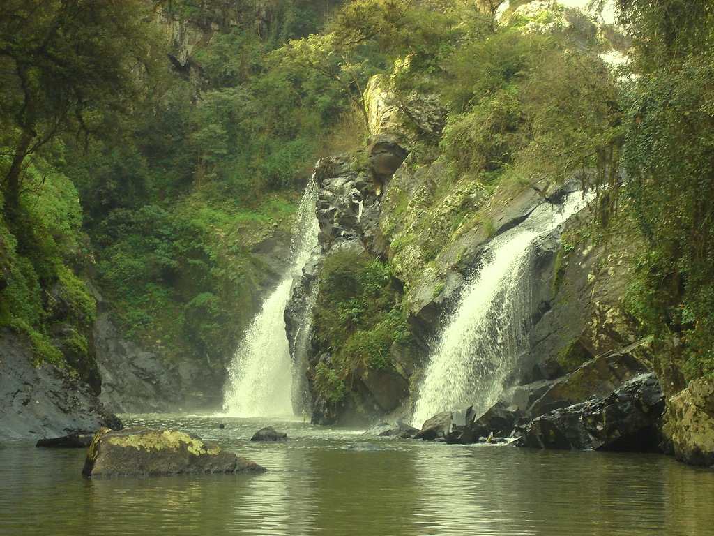 Cascata São Miguel, em Dois Irmãos